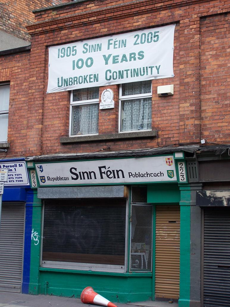 Antigua sede del Sinn Fein en la ciudad de Dublín cerca de Capel Street